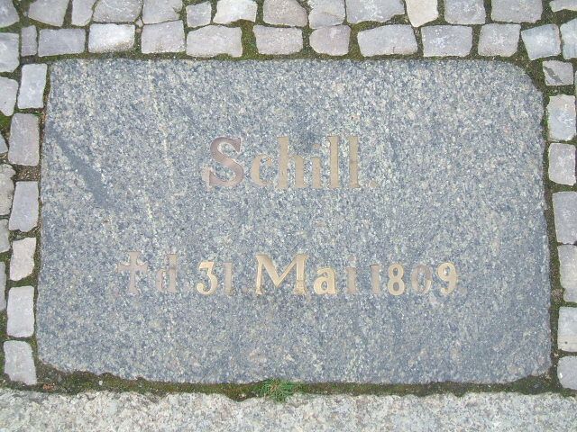 Stralsund,_Germany,_Fährstraße,_Schill-Gedenkstein_(2006-09-29)